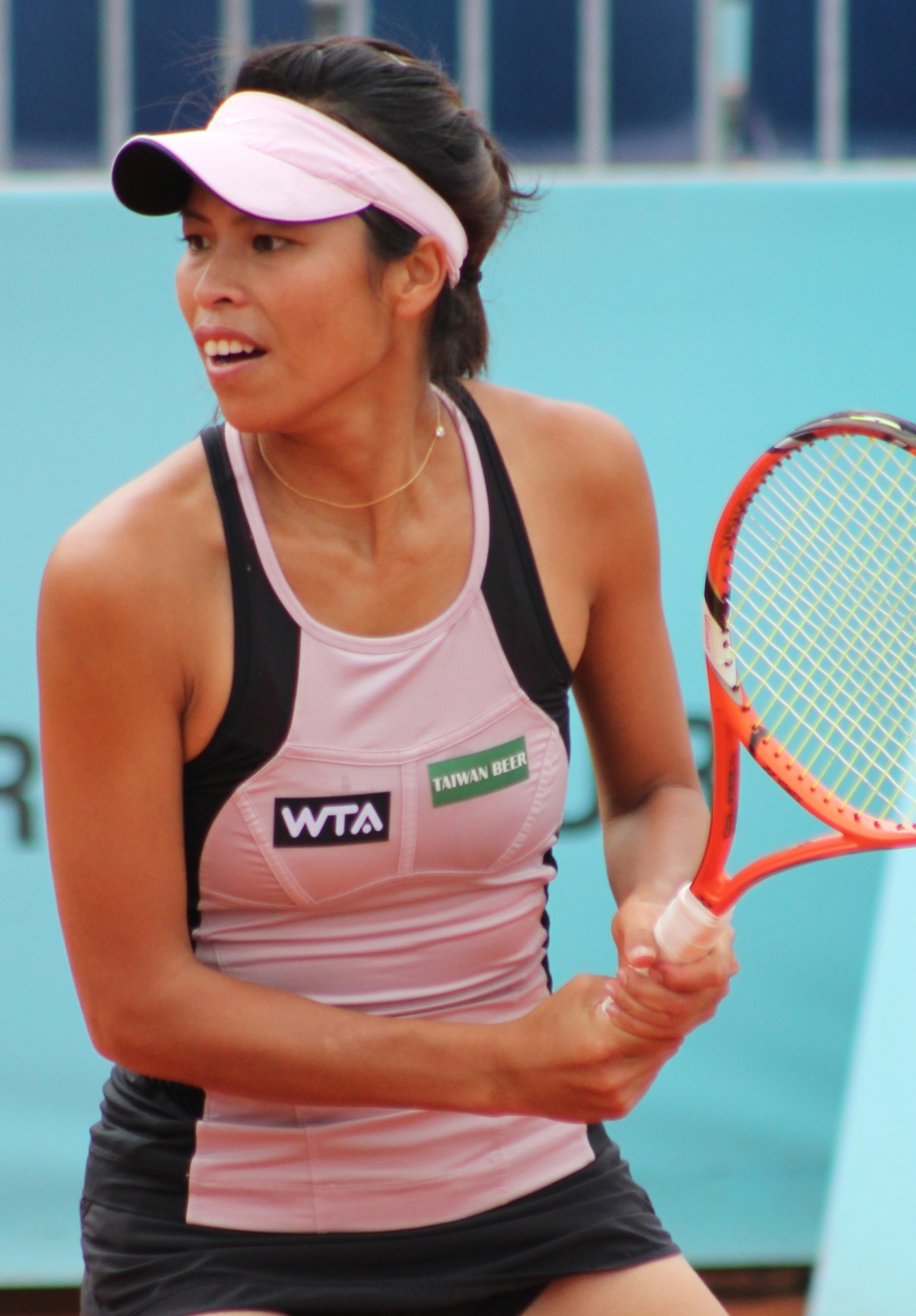 Hsieh MA14 (6)